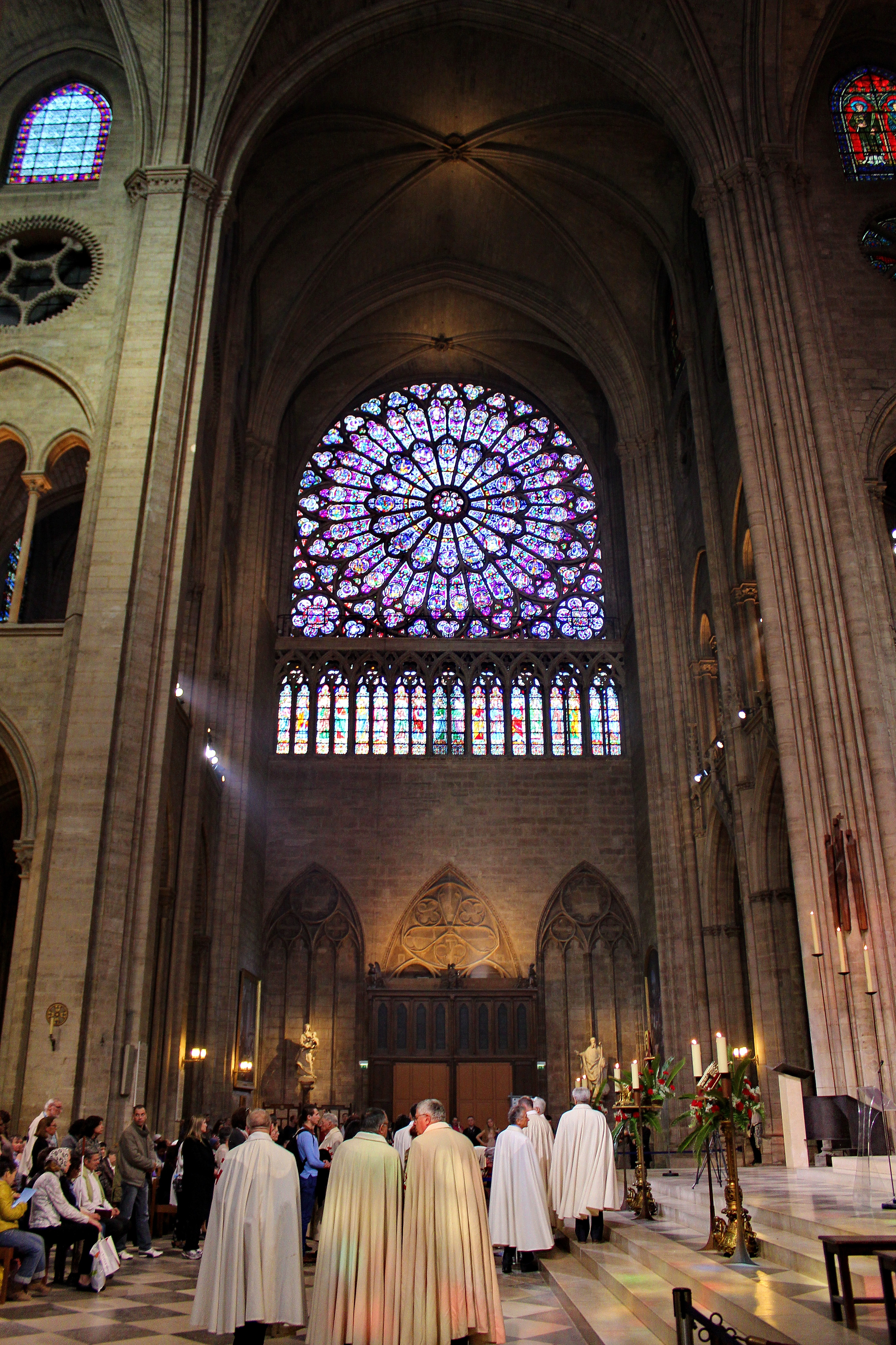 Notre Dame Querschiff